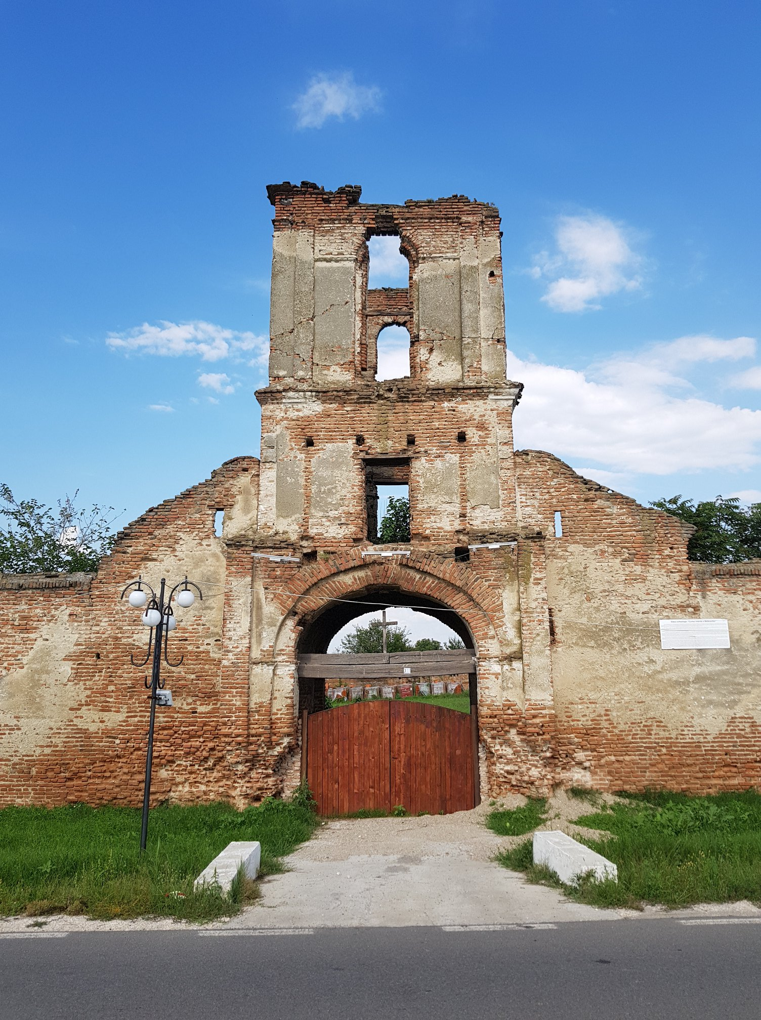 Dispozitivul principal de apărare este un turn de clopotniță al porții ridicat pe 3 niveluri, inegale ca înălțime. La nivelul al doilea se păstrează vizibilă pe tencuială urma acoperișului în două ape a unui balcon de observație din lemn. Pentru mai multe informatii, accesati